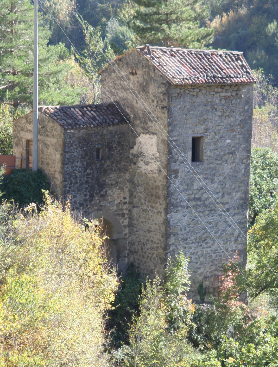 Porta di Sant'Agata di Arquata del Tronto, esterno giorno, ottobre 2006.